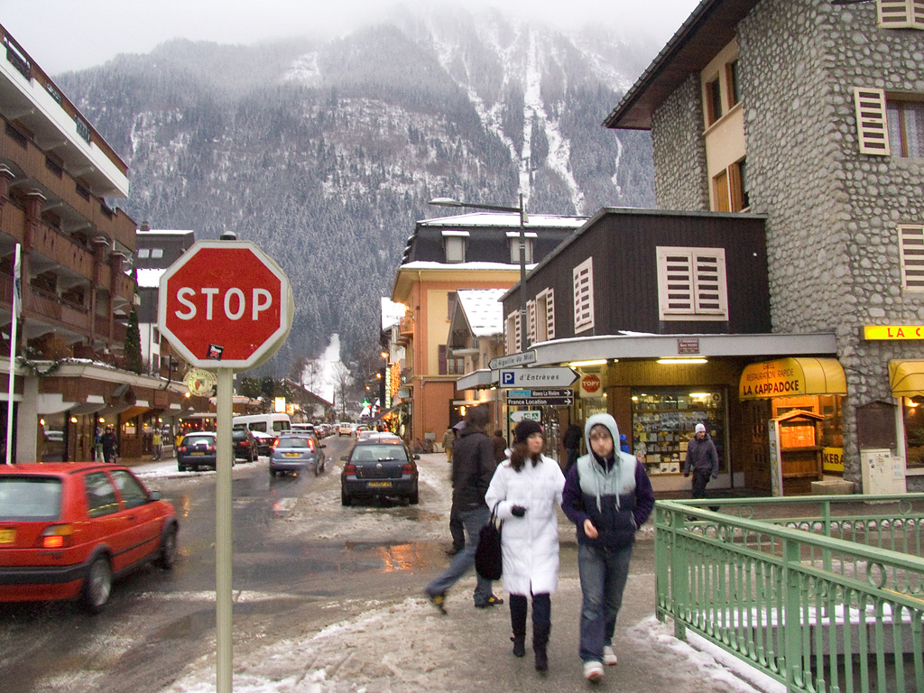 Avenue de l'aiguille du Midi, l'une des rues passantes de Chamonix.